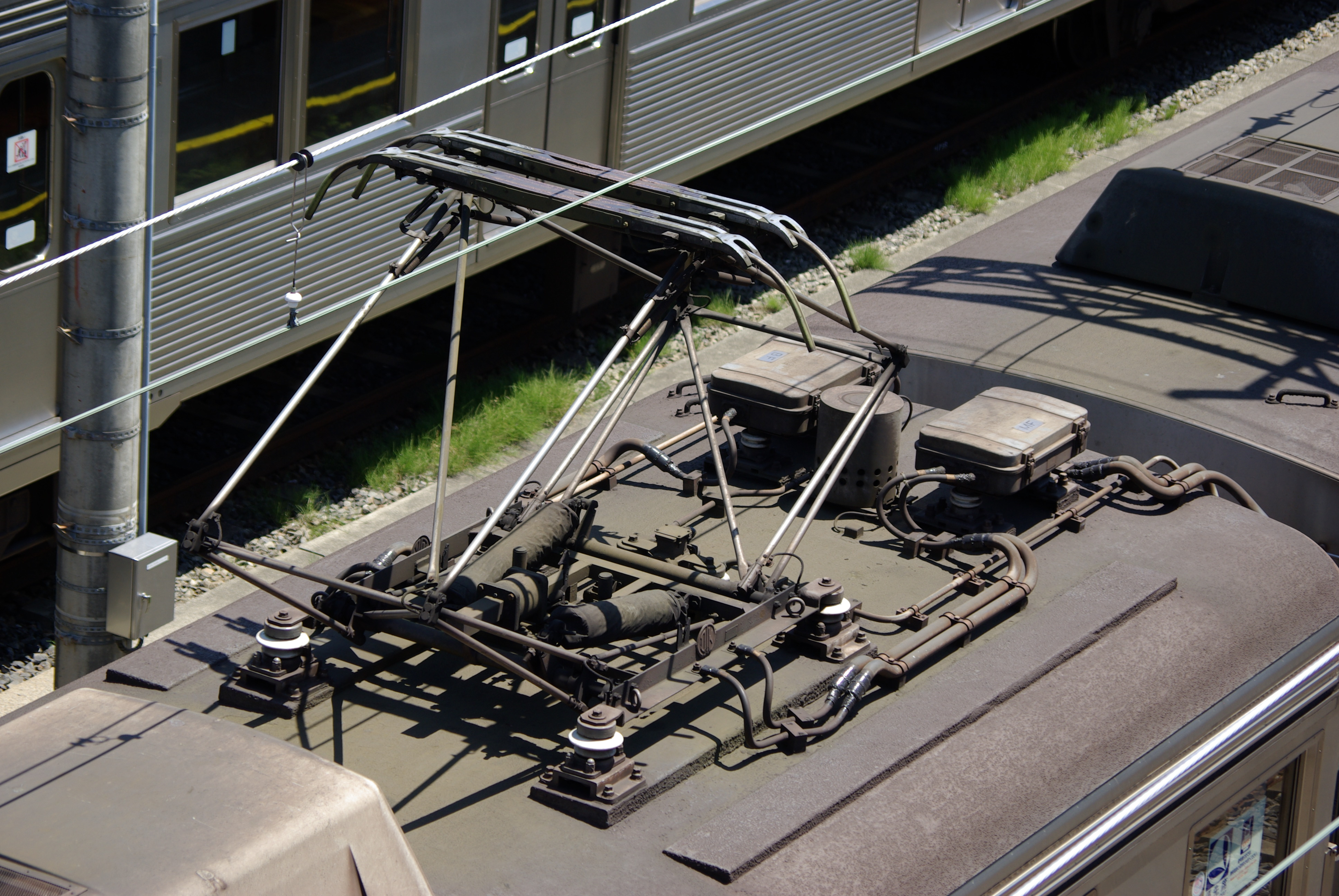 東急8500系8774号のパンタグラフ（PT-4309S-A-M形）